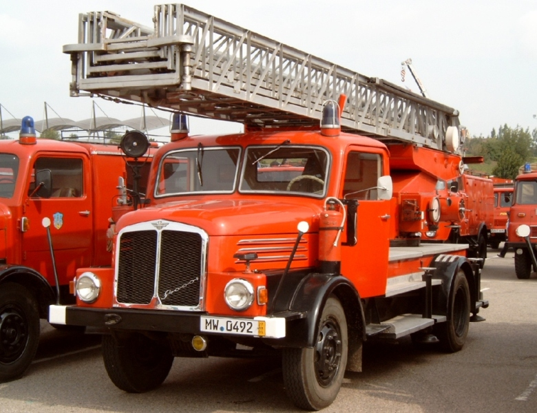 Drehleiter DL 25 auf Fahrgestell IFA S 4000-1, sie gehörte zur ersten Drehleiter-Fahrzeuggeneration in der DDR.